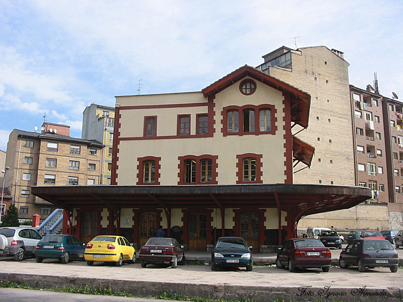 Mieres: Antigua estación del ferrocarril de vía estrecha Vasco-Asturiano, hoy englosado en FEVE.